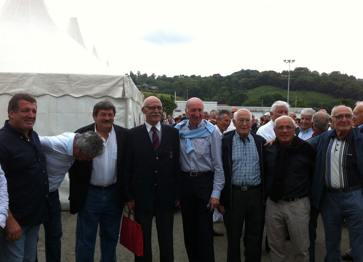 C’était le 6 juillet 2014, l’anniversaire de Michel Crauste, dit Le Mongol, qui fêtait ses 80 ans. L’événement se déroulait à Lourdes, au stade Antoine Béguère.